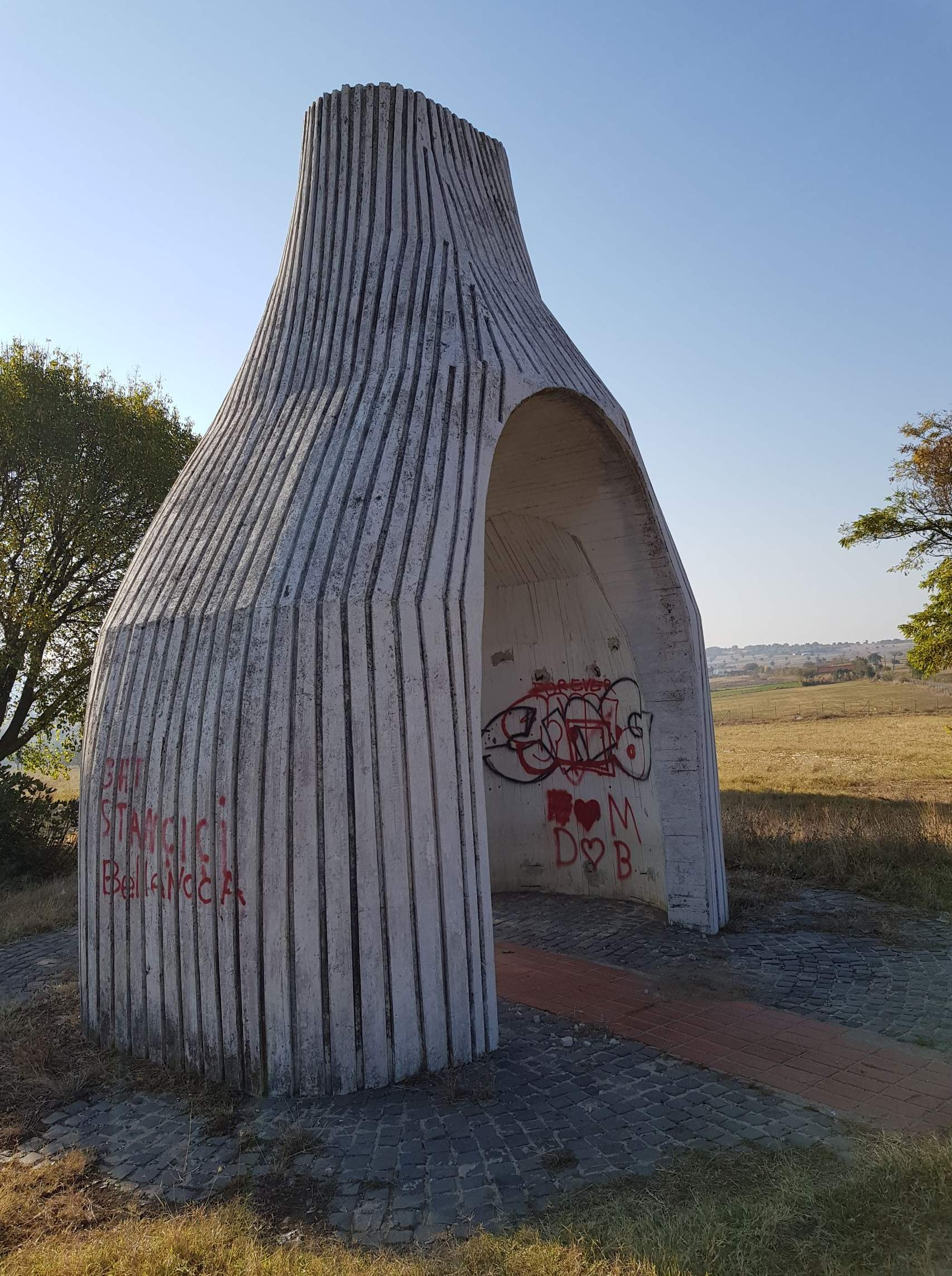 Споменик кај Менкова колиба, Кумановско, на местото на формирање на Карадачкиот партизански одред во 1941 година